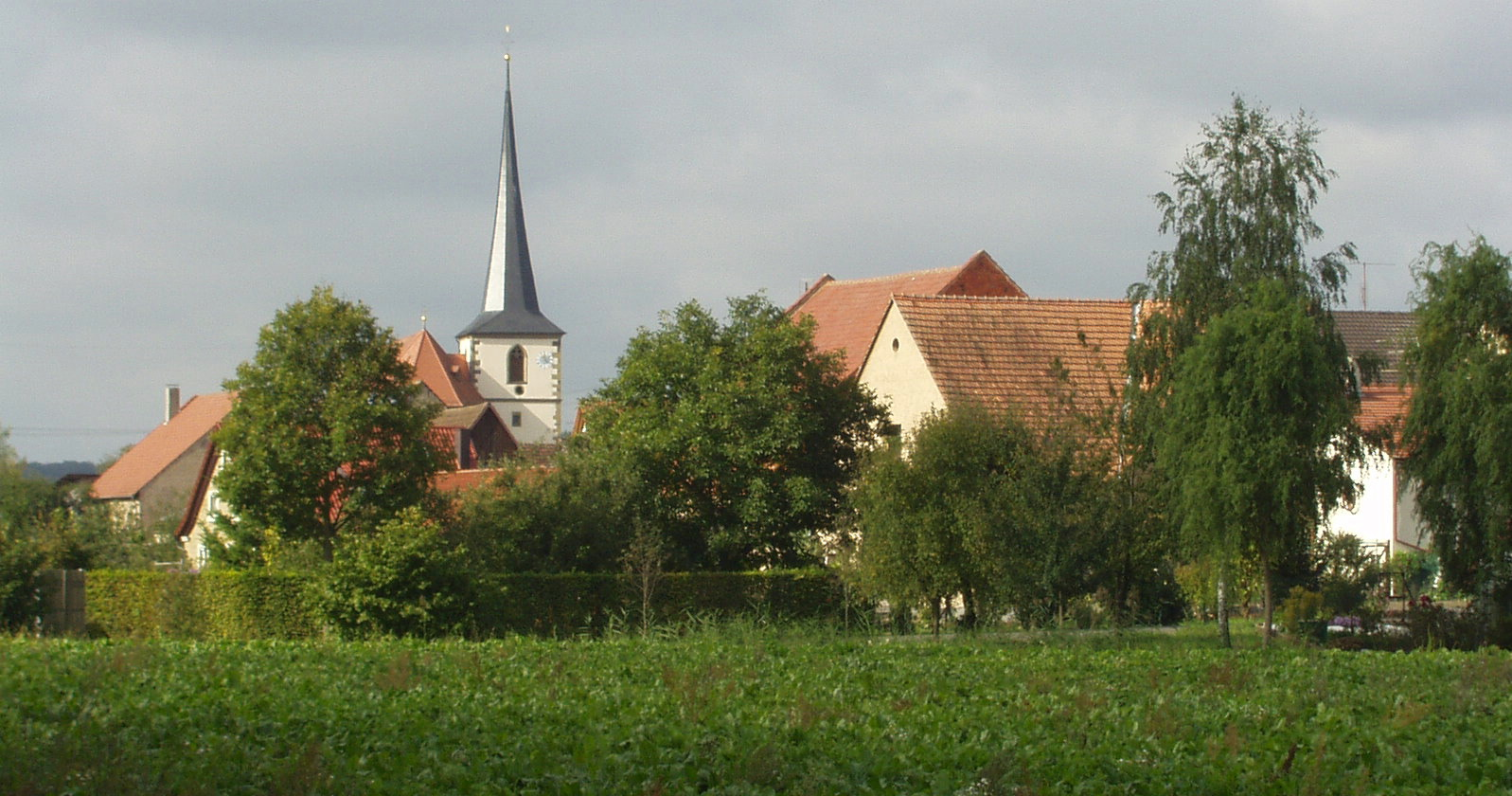 Zeuzleben von Osten aus gesehen